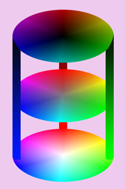 Additive RGB-Mischung